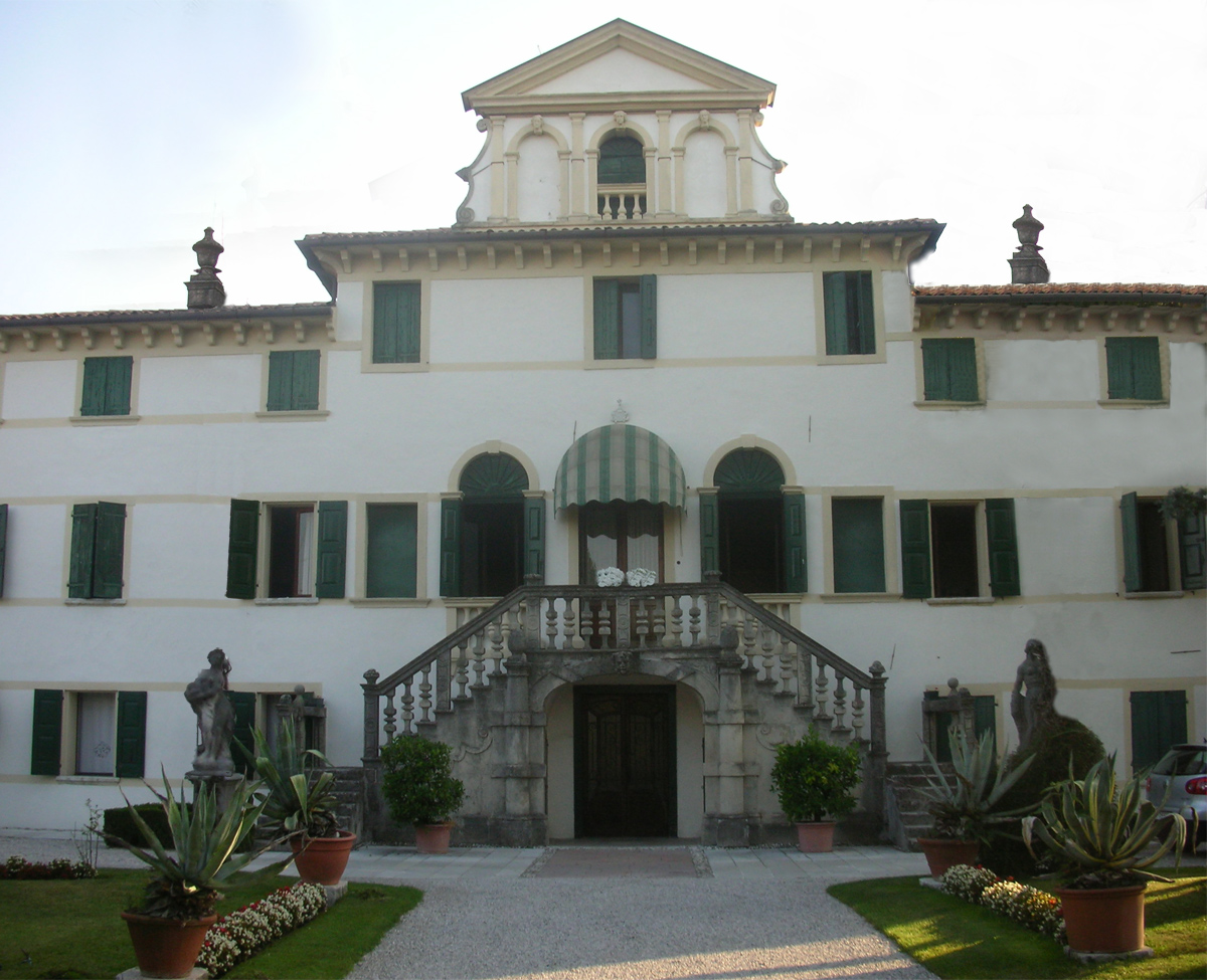 Fronte Villa Ninfa Priuli Orsago